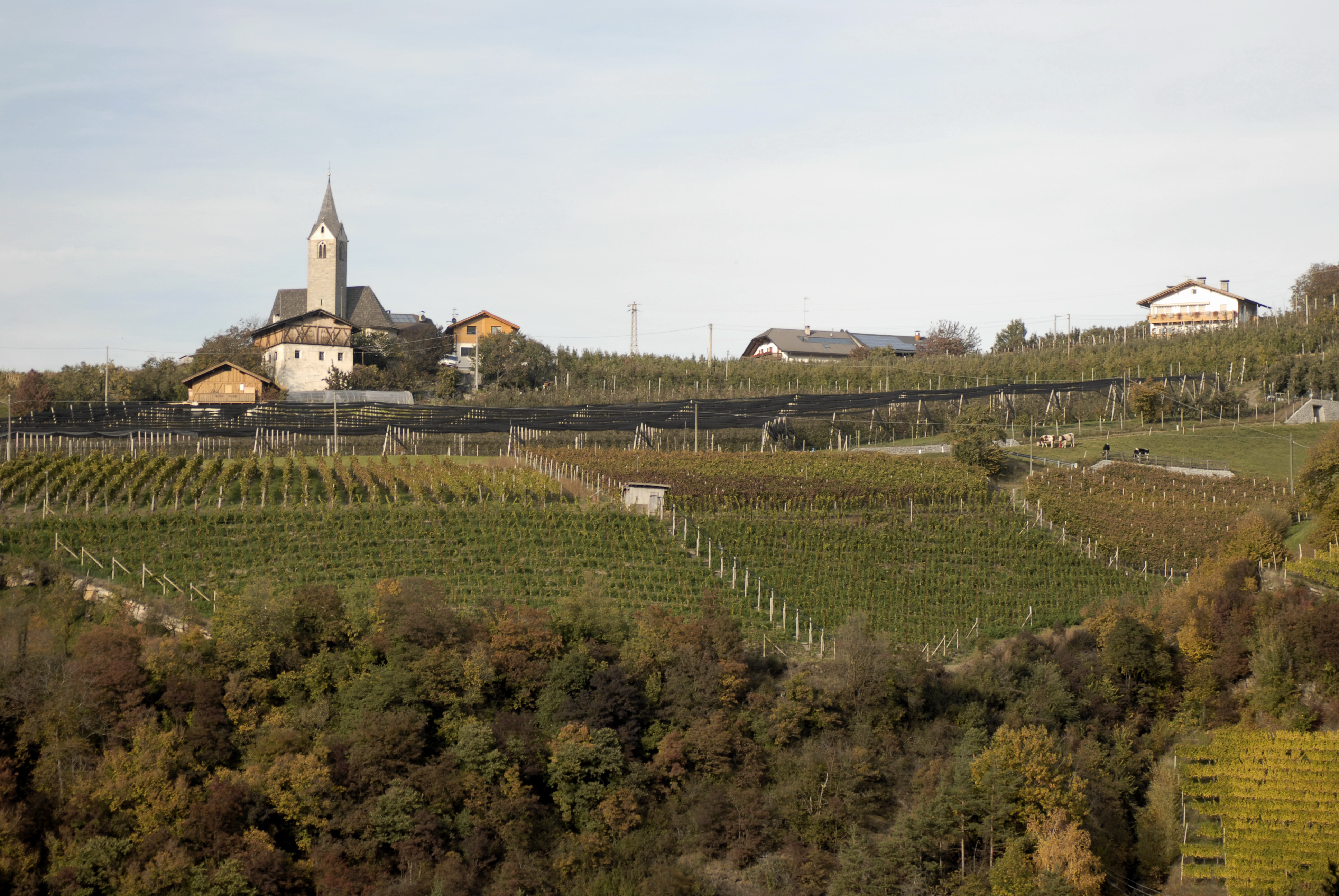 Der Weiler Nafen (Nava), westlich von Teis (Tiso), Gemeinde Villnöss